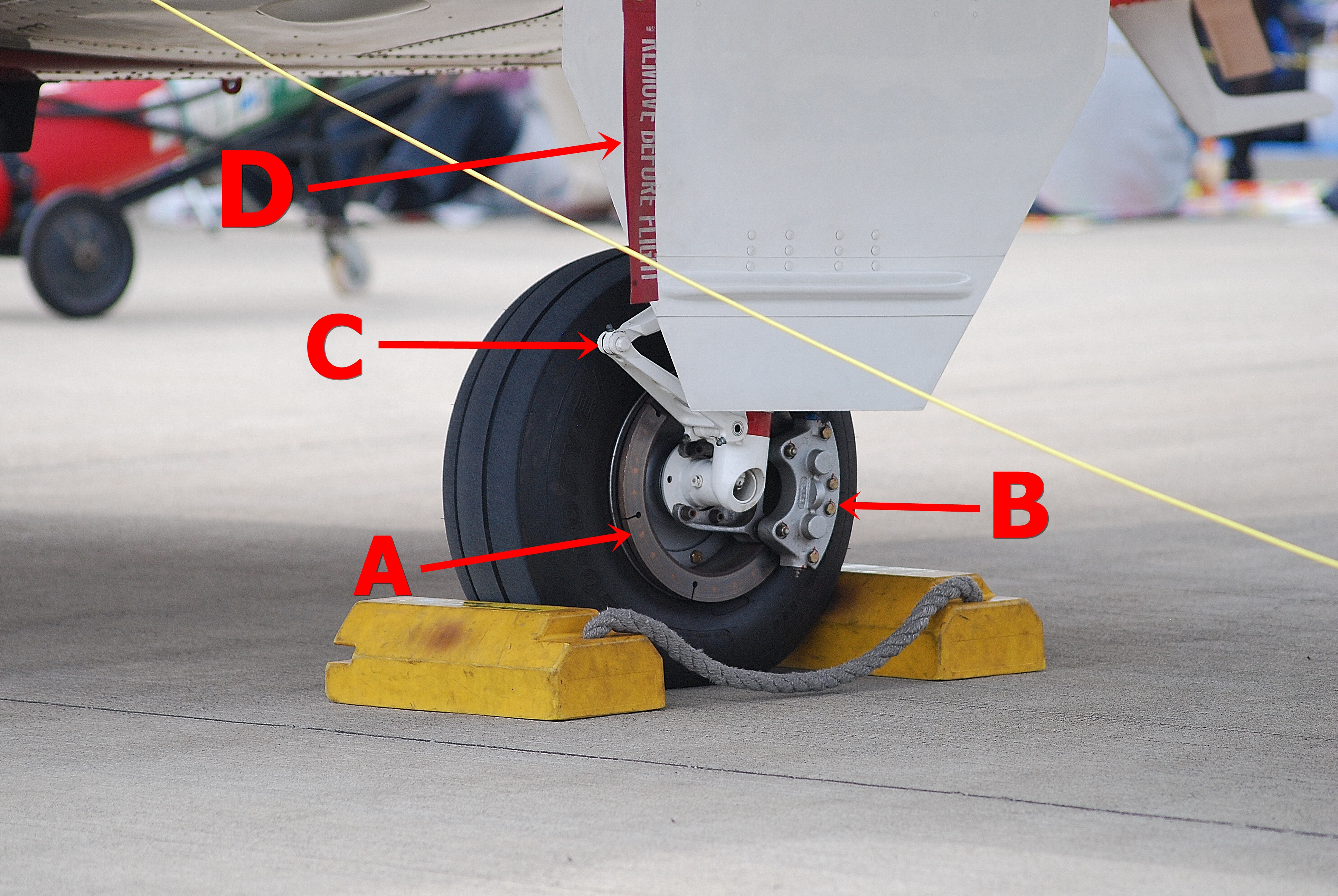 航空自衛隊T-7初等練習機の主脚。A車輪に取付けられているブレーキ・ディスク、Bブレーキ装置（ブレーキハウジング）、Cトルク・リング、Dグラウンド・ロックの赤色のテープ。（2013年の入間基地航空際にて撮影）